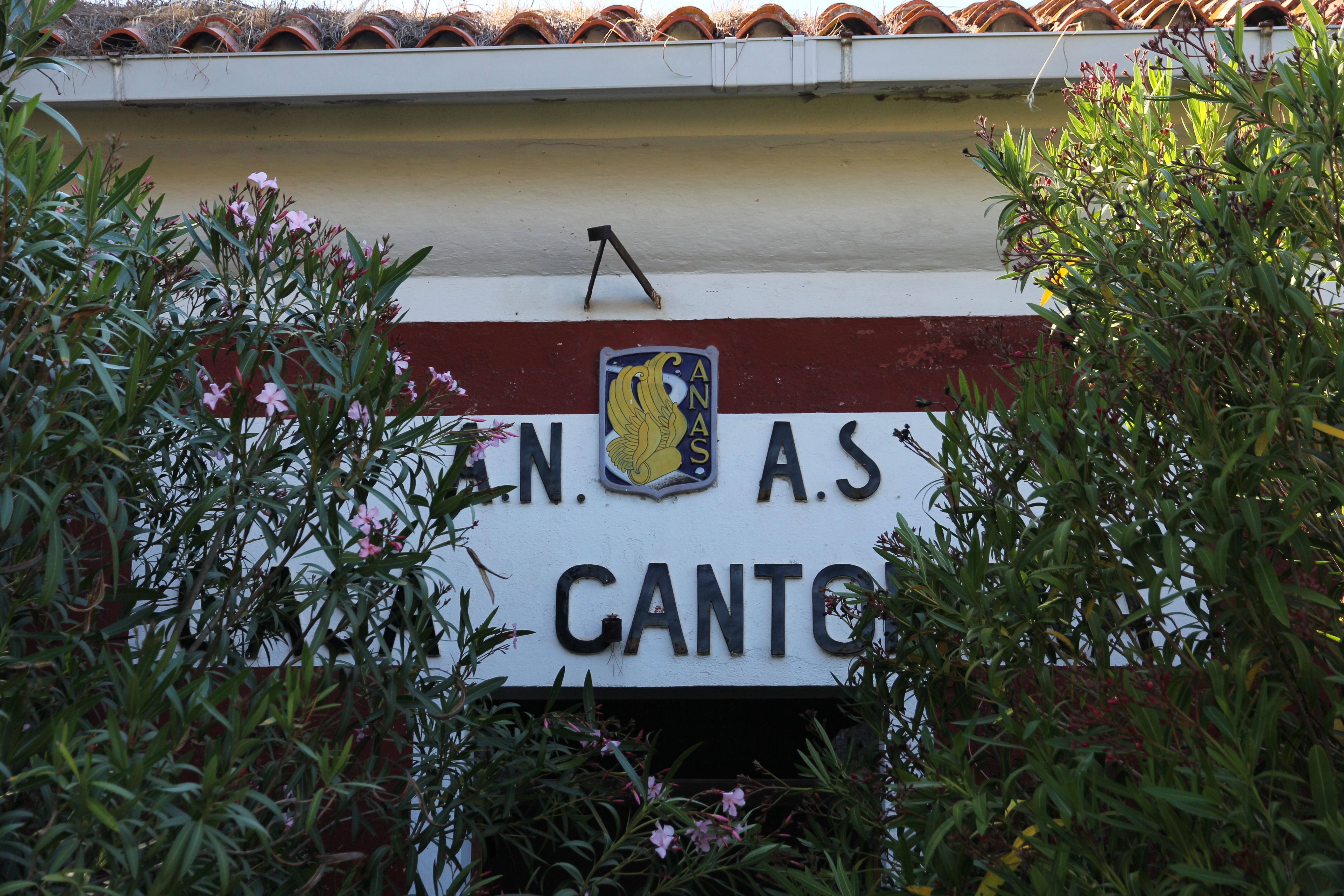 Luogosanto - Casa cantoniera di Locusantu